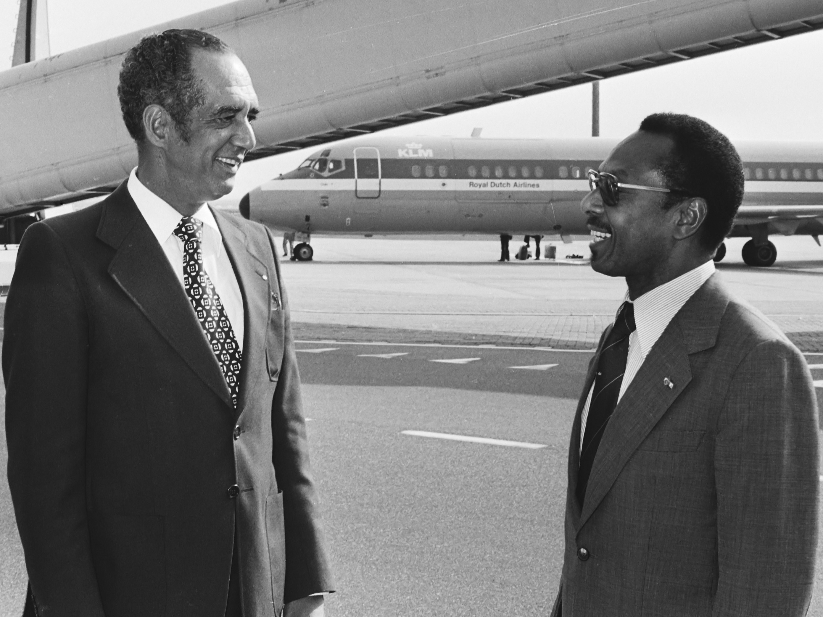 Aankomst van de Surinaamse minister van Financiën, de Goede op Schiphol; minister de Goede (links) en ambassadeur van Eer 6 juni 1979